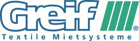 Logo von Greif Textile Mietsysteme